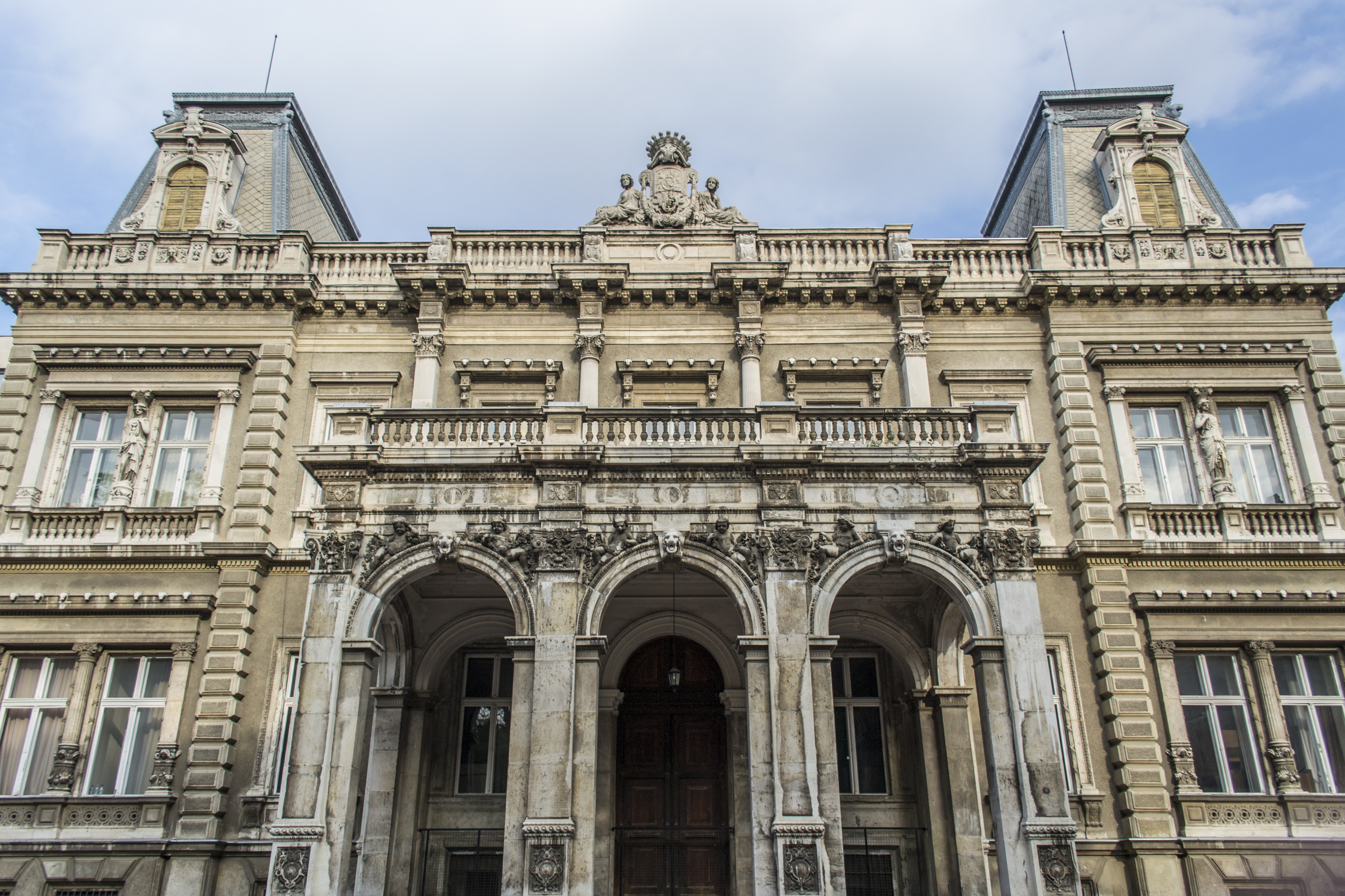 Károlyi-palota This is a photo of a monument in Hungary. Identifier: 952